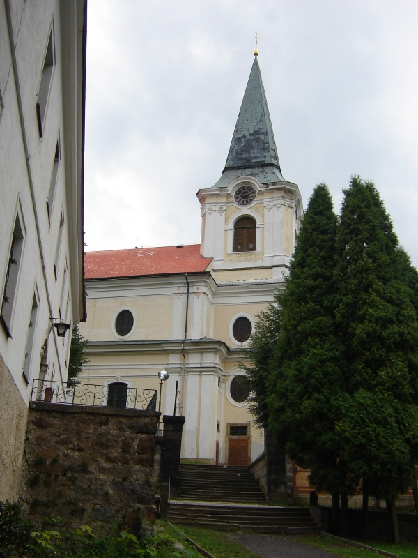 Kostel sv.Jiří v Jiříkově